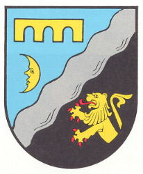 Wappen Glanbruecken